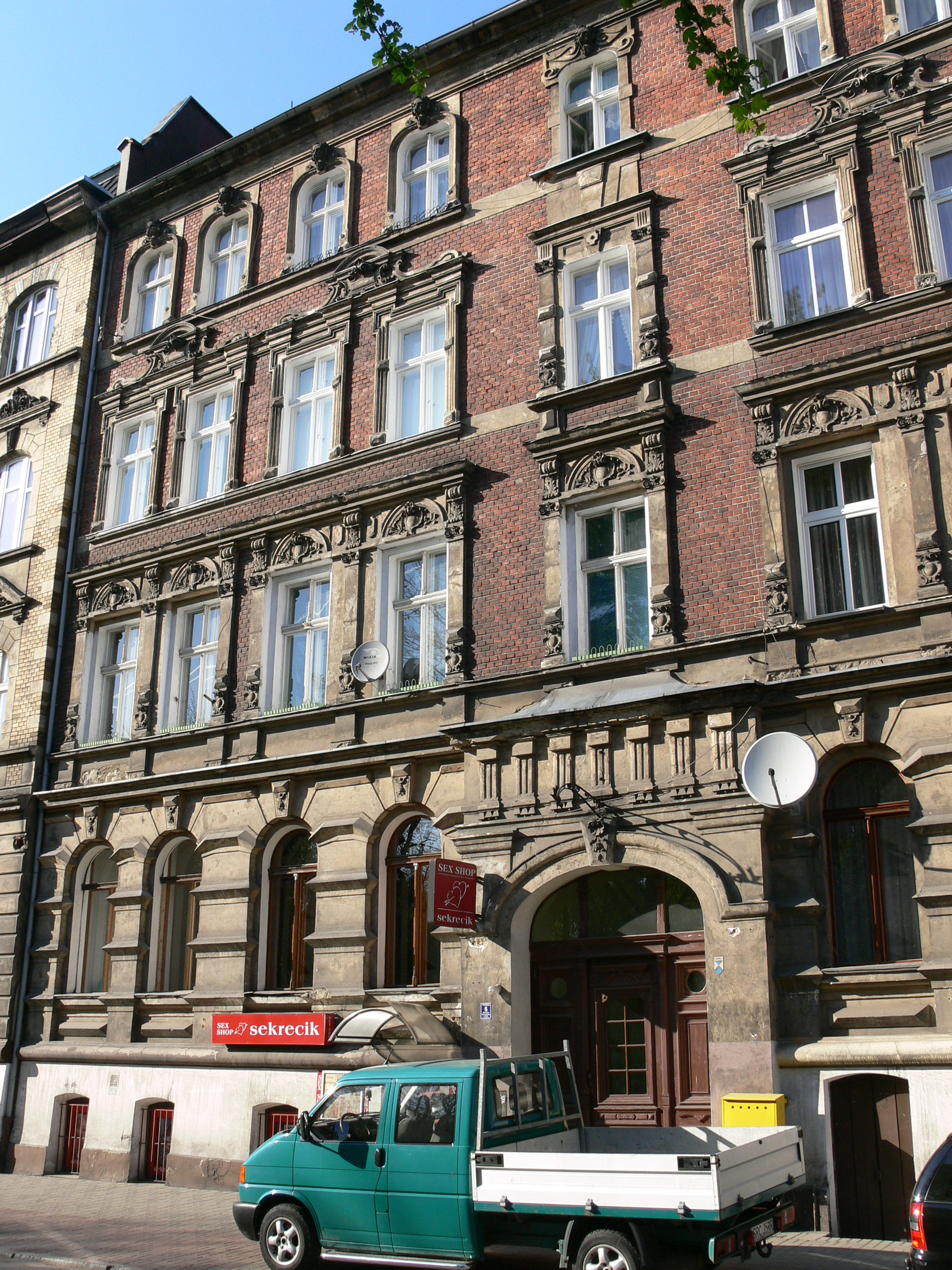 Racibórz — kamienica przy ul. Staszica nr 6